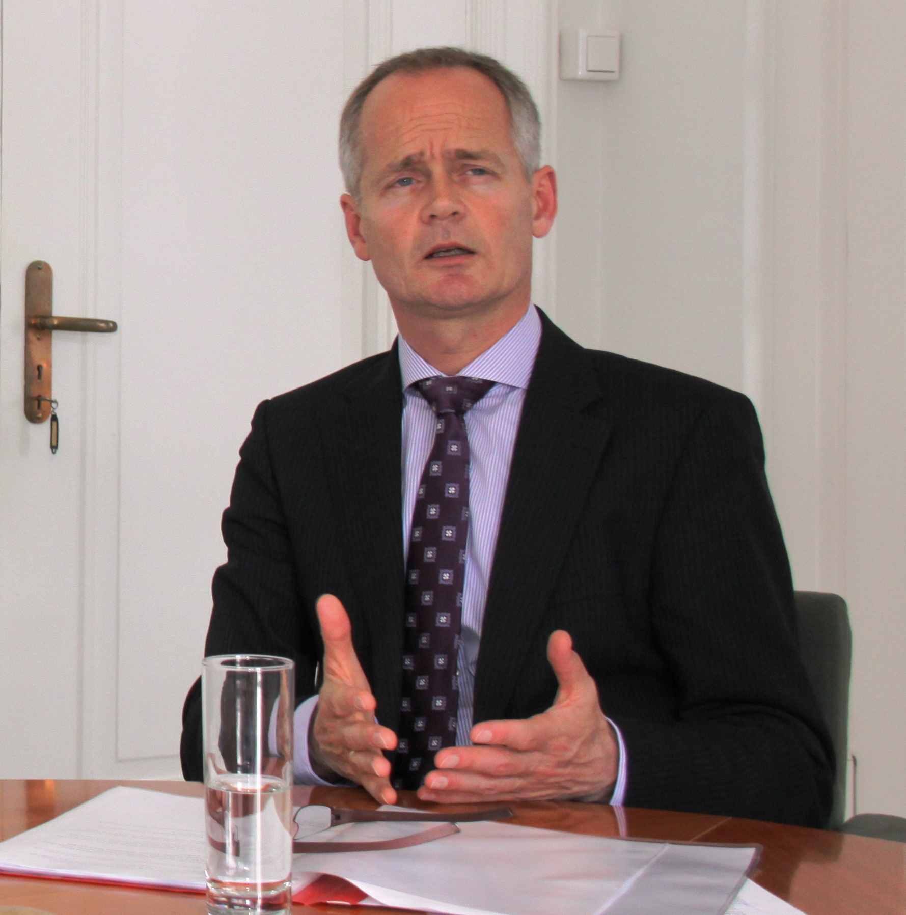 Mr. Niek Meijer, burgemeester van Zandvoort